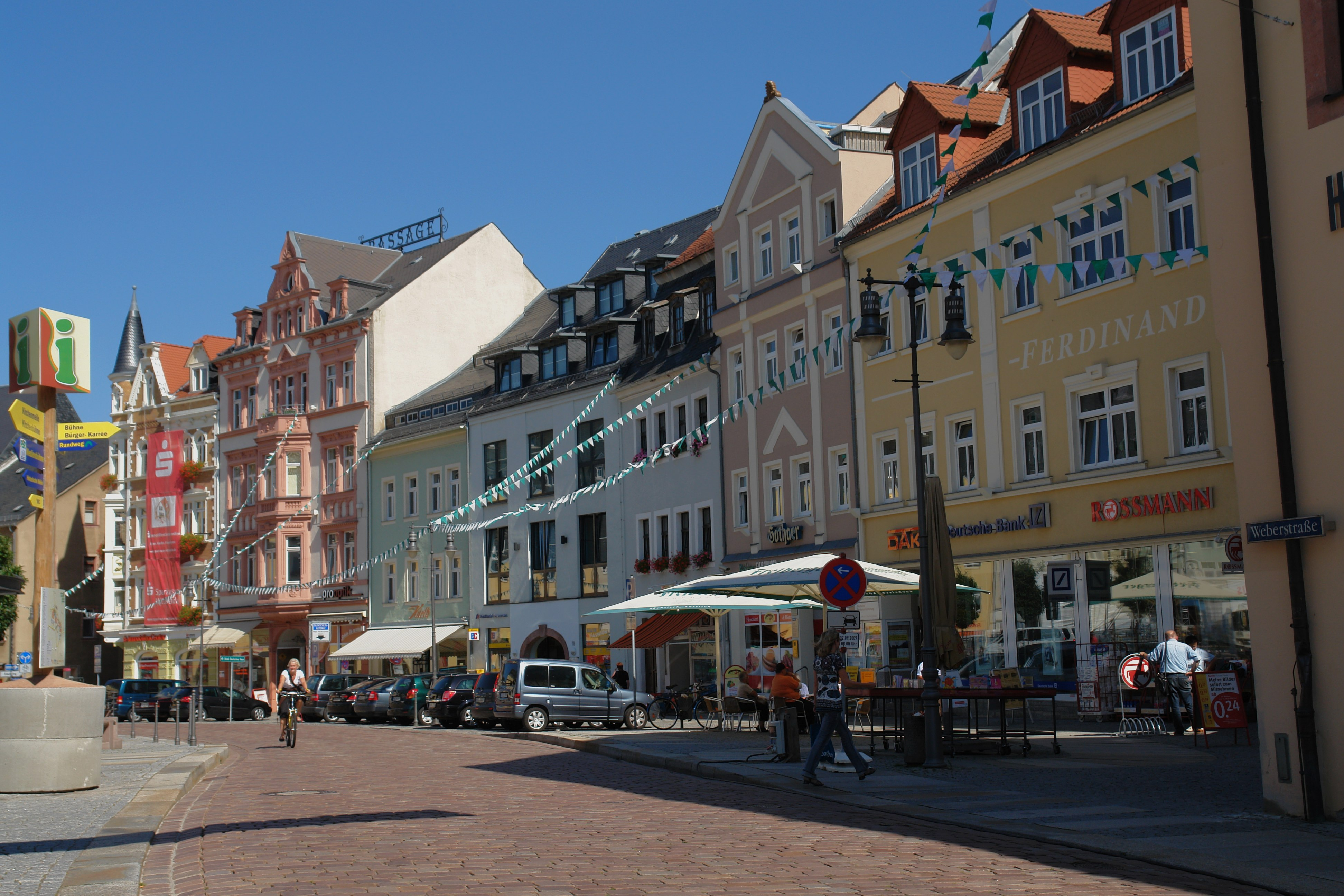 Marktplatz Mittweida